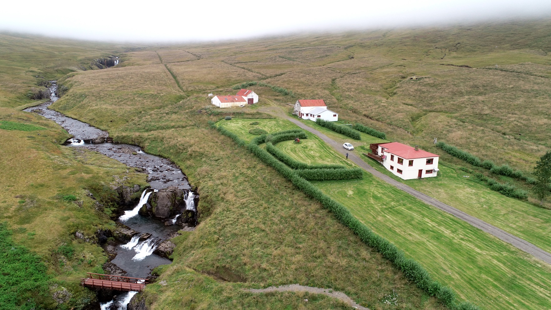 Seldalur í Norðfirði, Fjarðabyggð, Íslandi. Seldalsá og Bæjarfoss